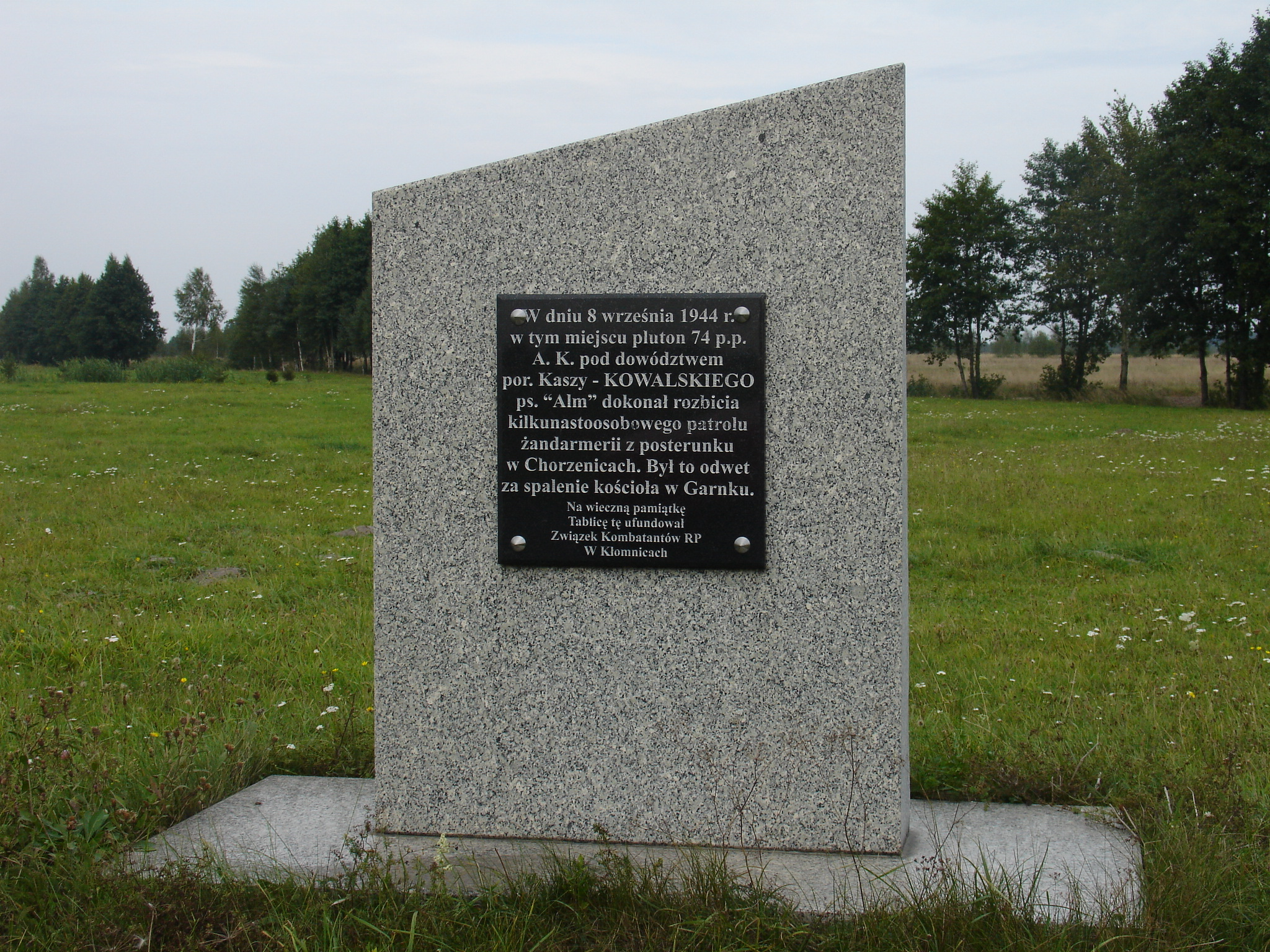 Pamiątkowa tablica poświęcona rozbiciu niemieckiego oddziału w 1944 r. umieszczona przy drodze pomiędzy Karczewicami i Pacierzowem